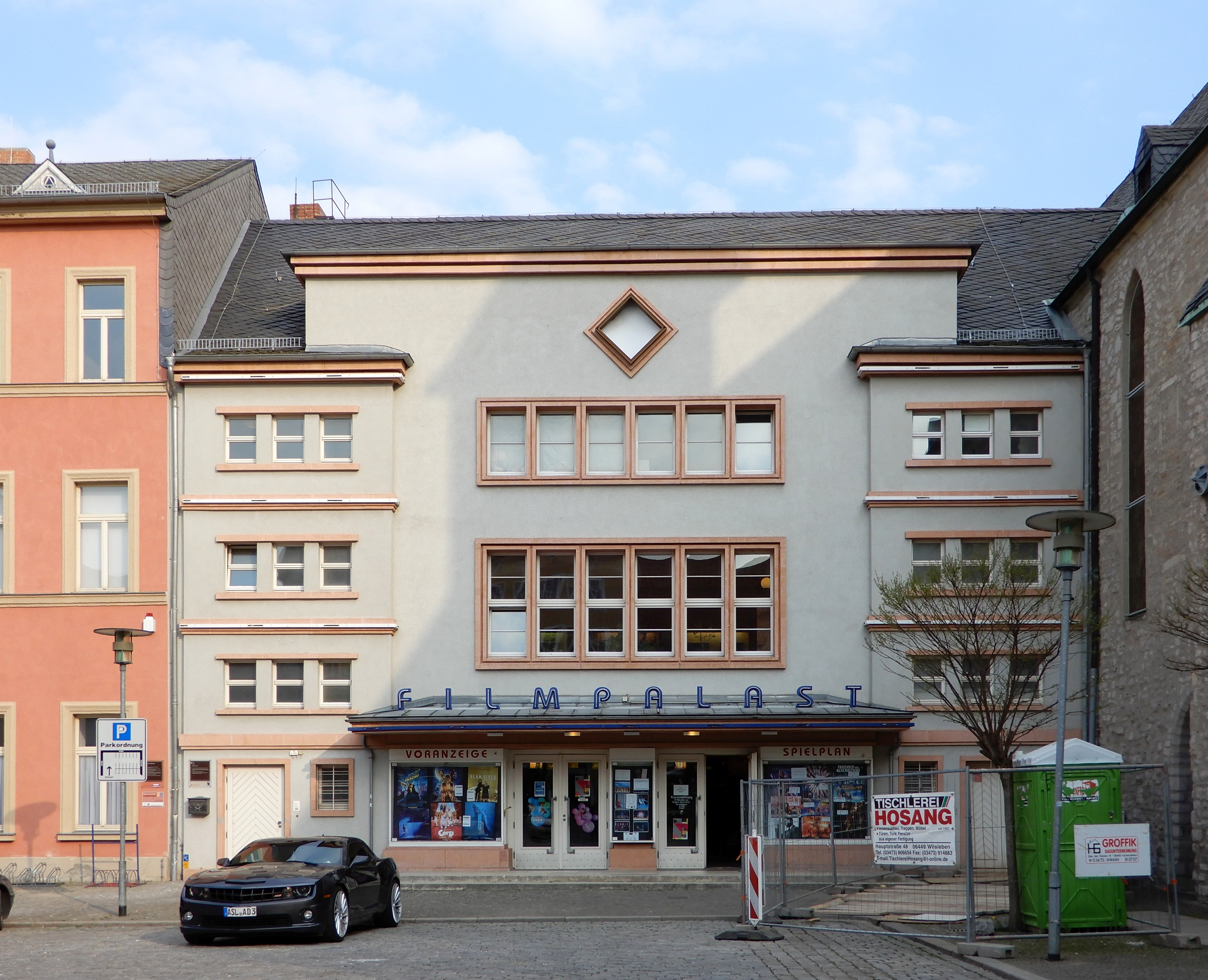 Kinogebäude Markt 20 in Aschersleben